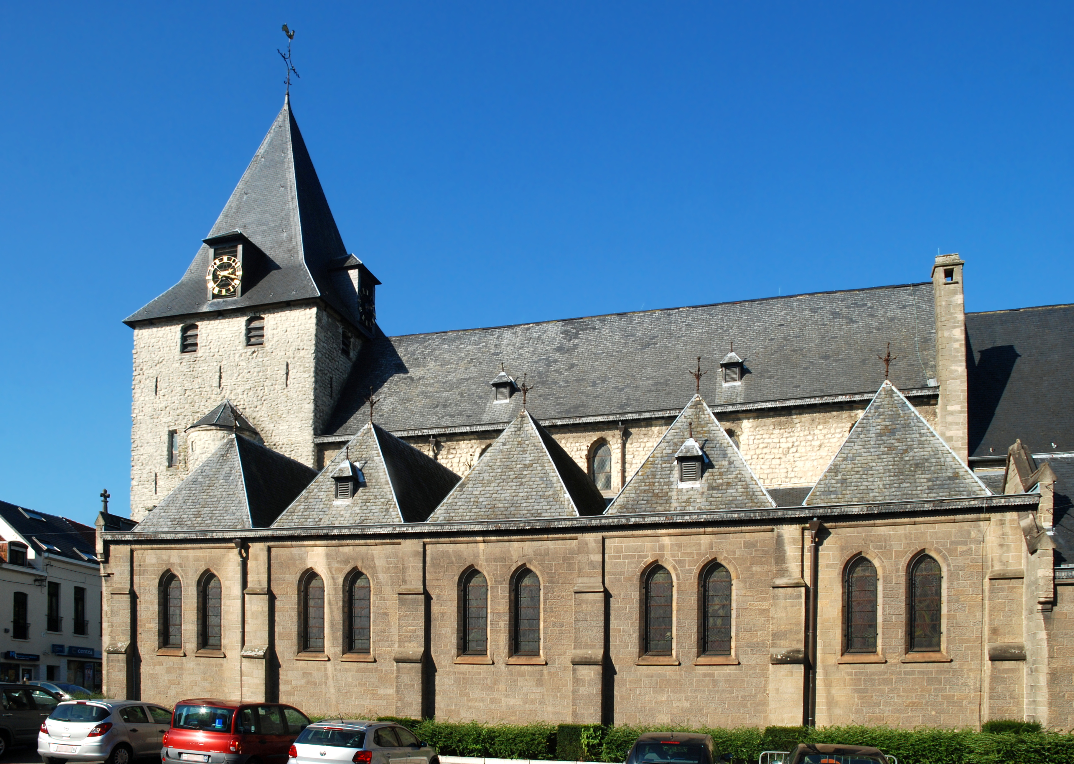 Belgique - Brabant wallon - Église Saint-Nicolas de La Hulpe